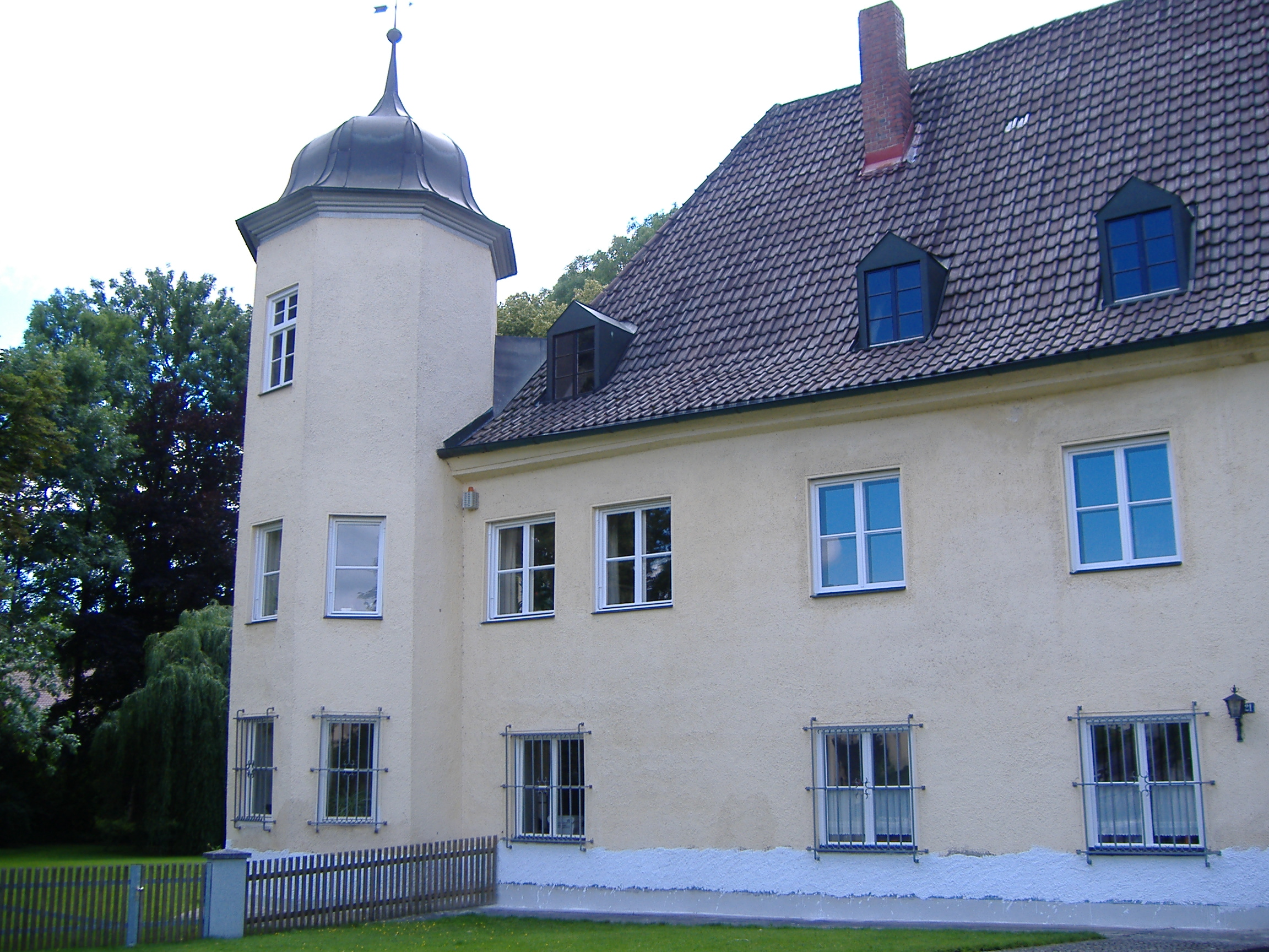 Hauptfront Schloss Mering